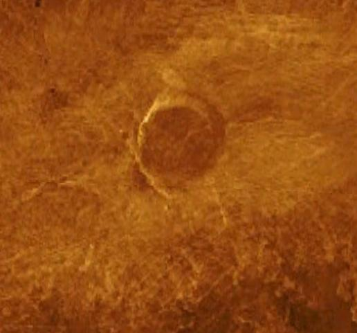 L'Abeona Mons pris à 282 km d'altitude.